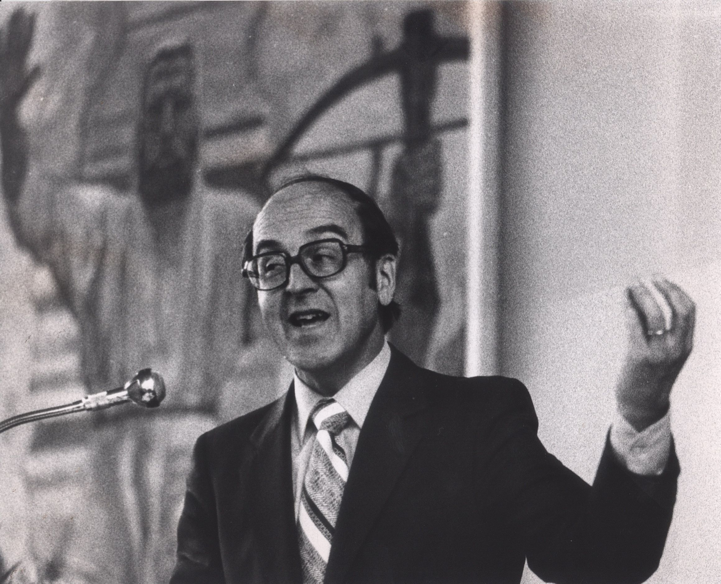 Kurt Furgler, schweizerischer Politiker Depicted person: Kurt Furgler – member of the Swiss Federal Council